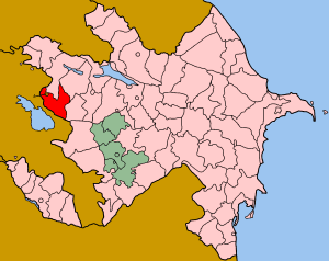 Map of Azerbaijan showing Gadabay (Gədəbəy) rayon.